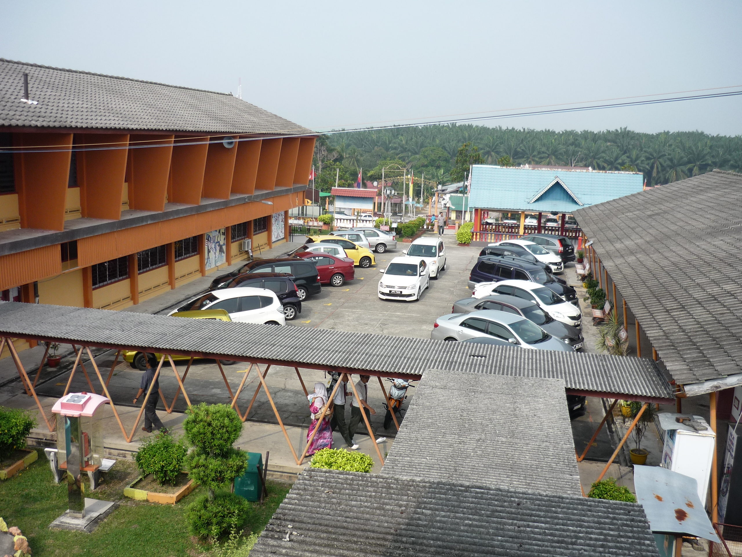 Panorama SMKDA 4